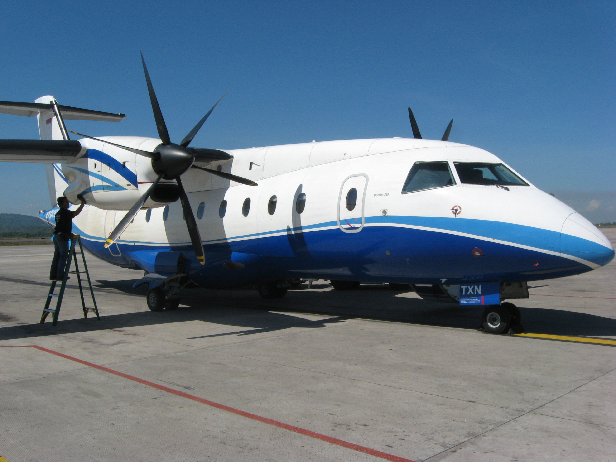 Syukuran Aminuddin Amir, Airport, Luwuk, Banggai Regency